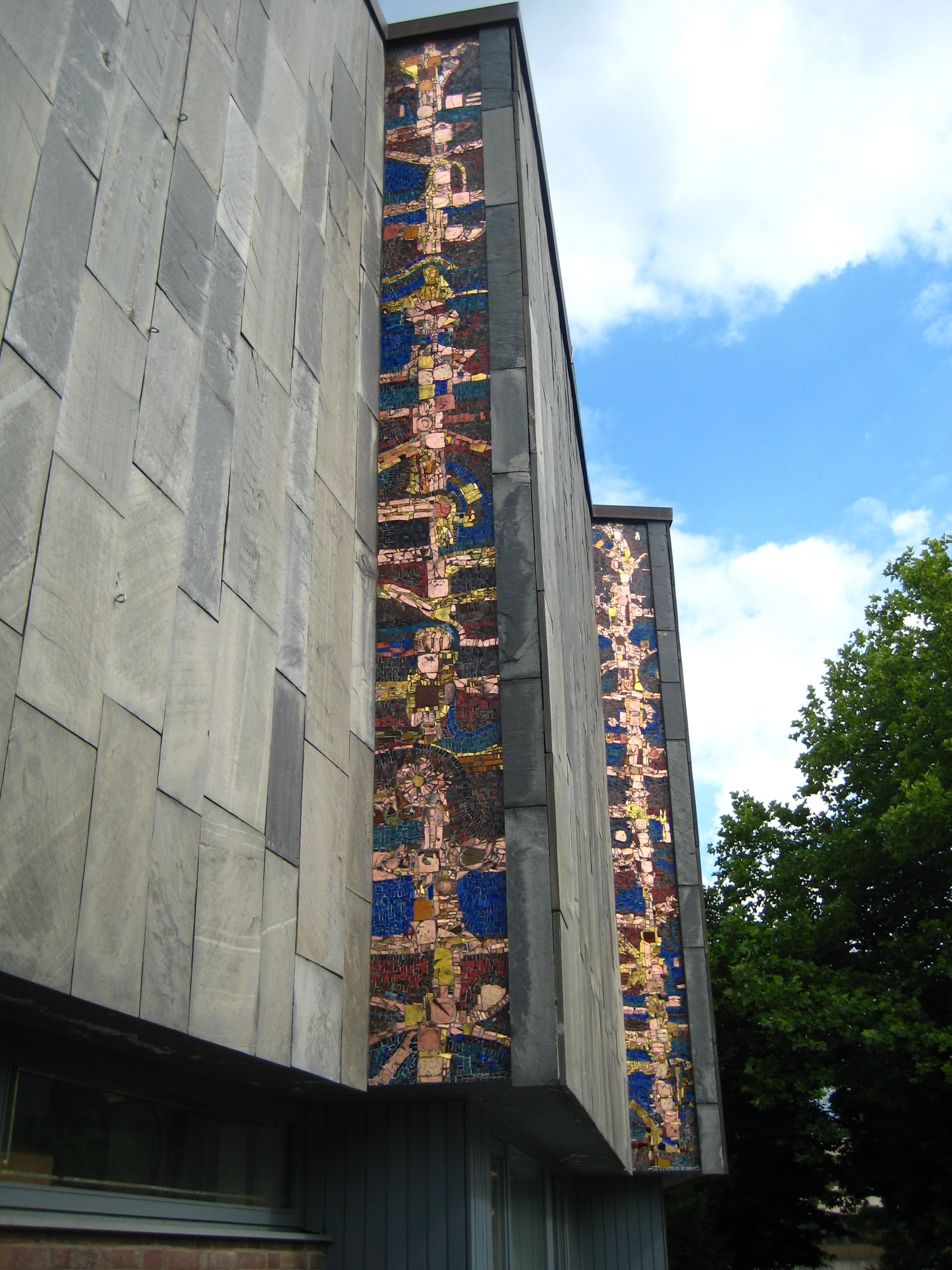 Georg Schmidt-Westerstede: Glasmosaik-Friese in der Fassade des Stadtmuseums Oldenburg. Wv-Nr. 2271-2272, 1968